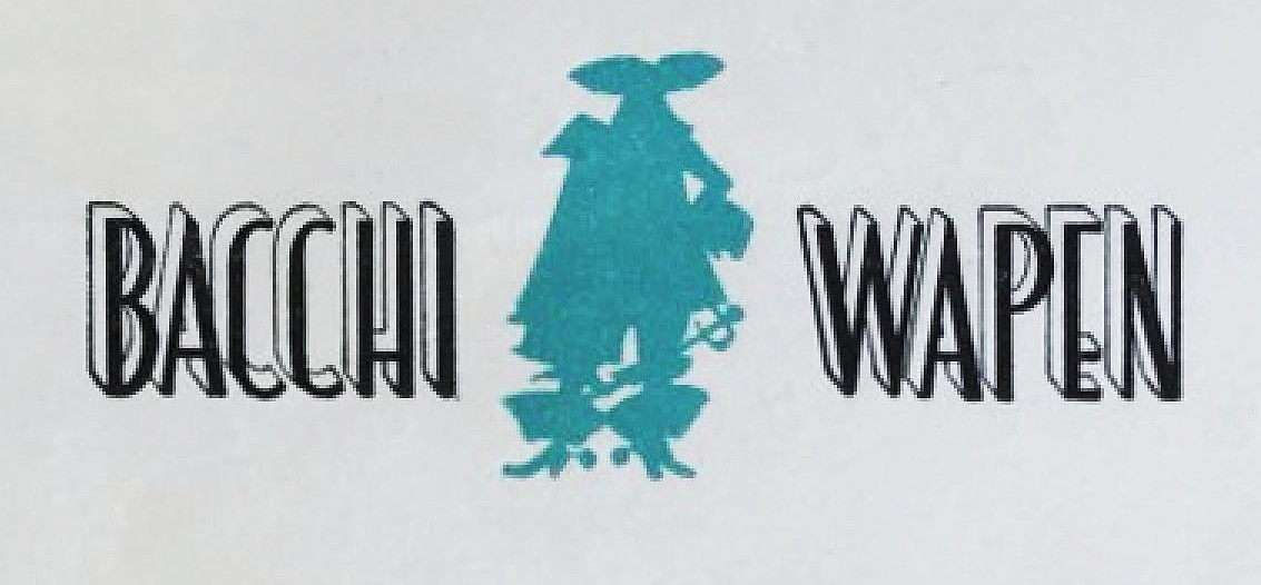 Bacci Wapen, logo på menyn